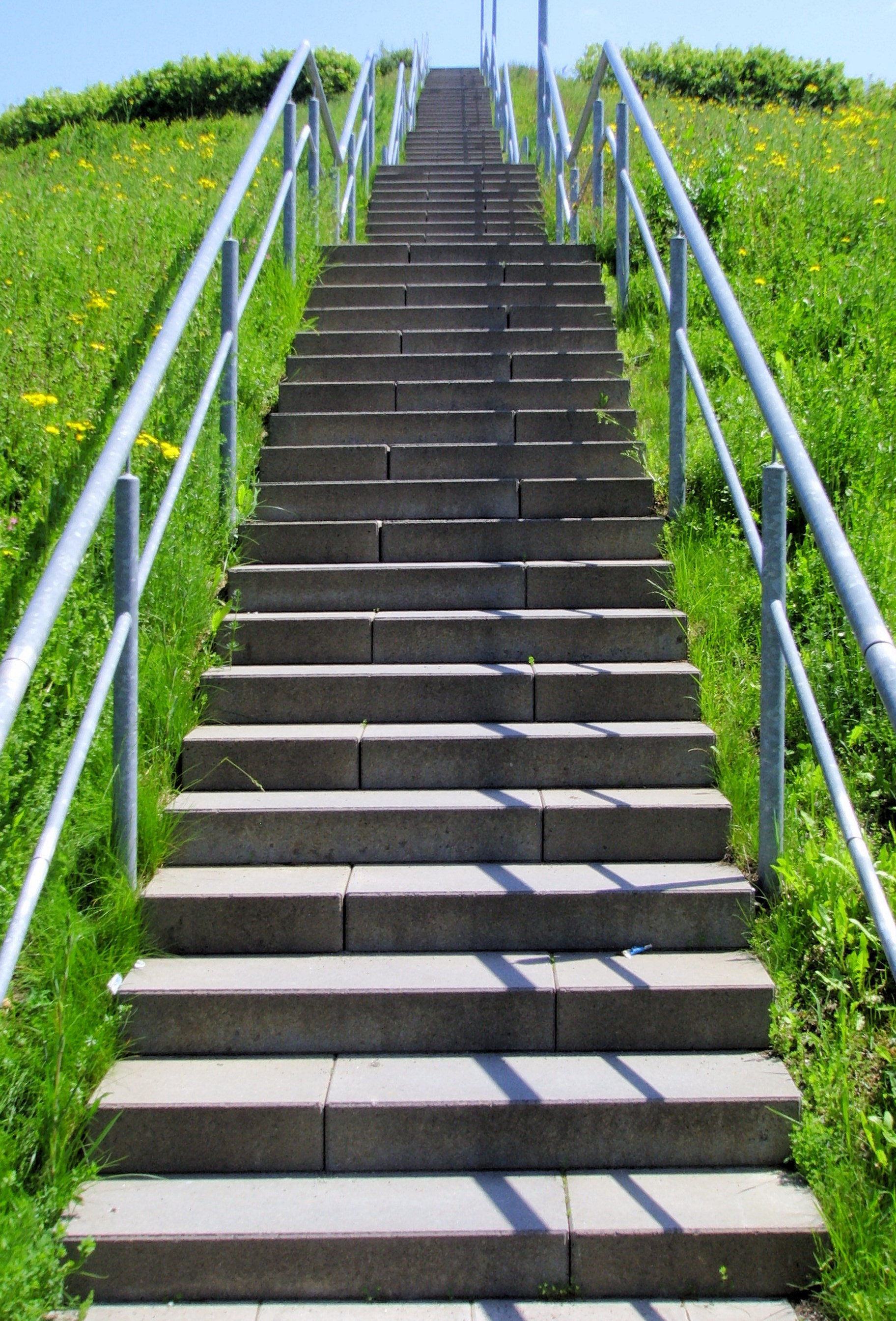 Treppe zum Parkplatz auf der Hochdeponie zwischen Riedwiese und Mertonviertel in Frankfurt am Main